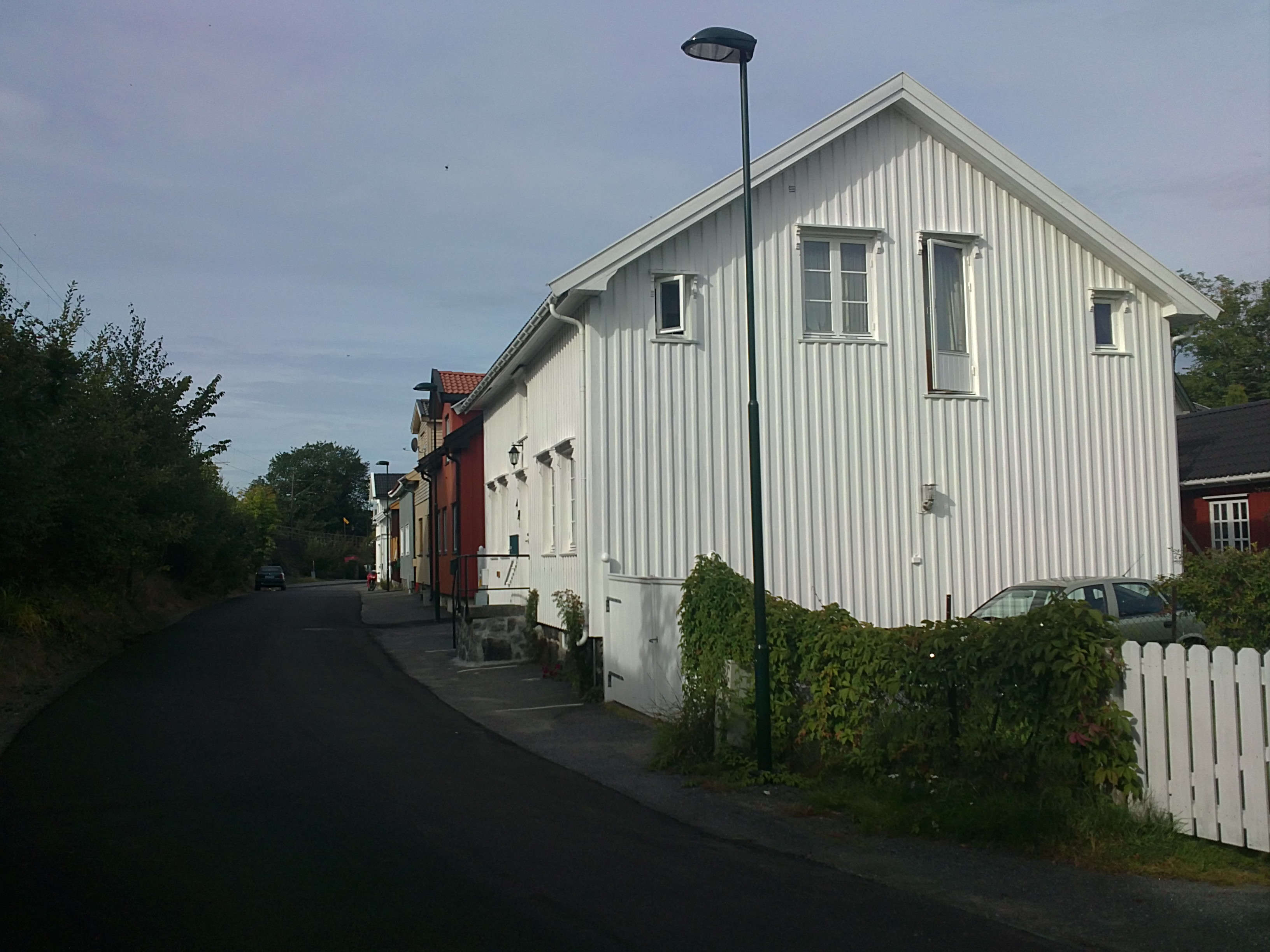 Bilde av hus Jernbanegata, Larvik